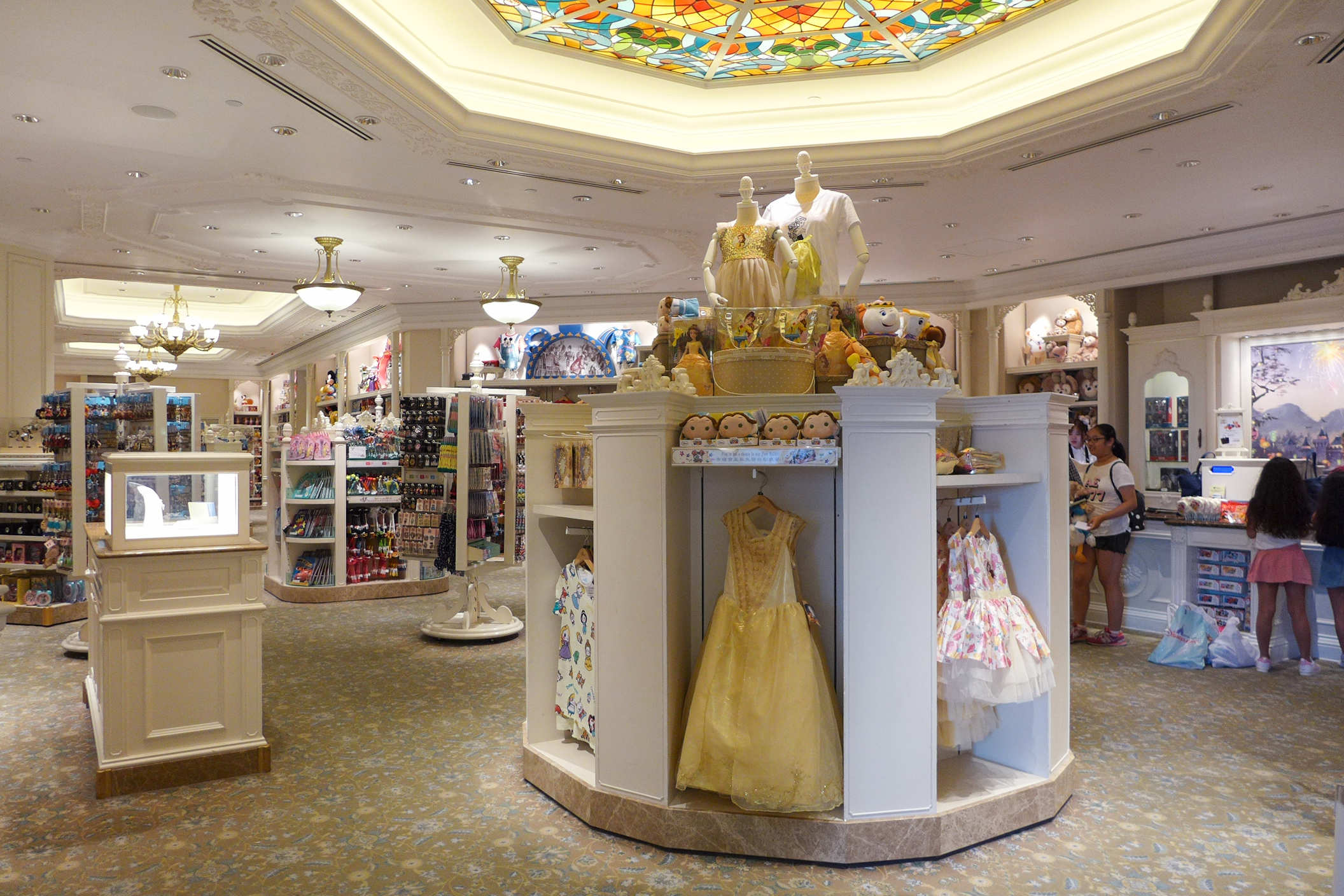 Hong Kong Disneyland Hotel Kingdom Gifts